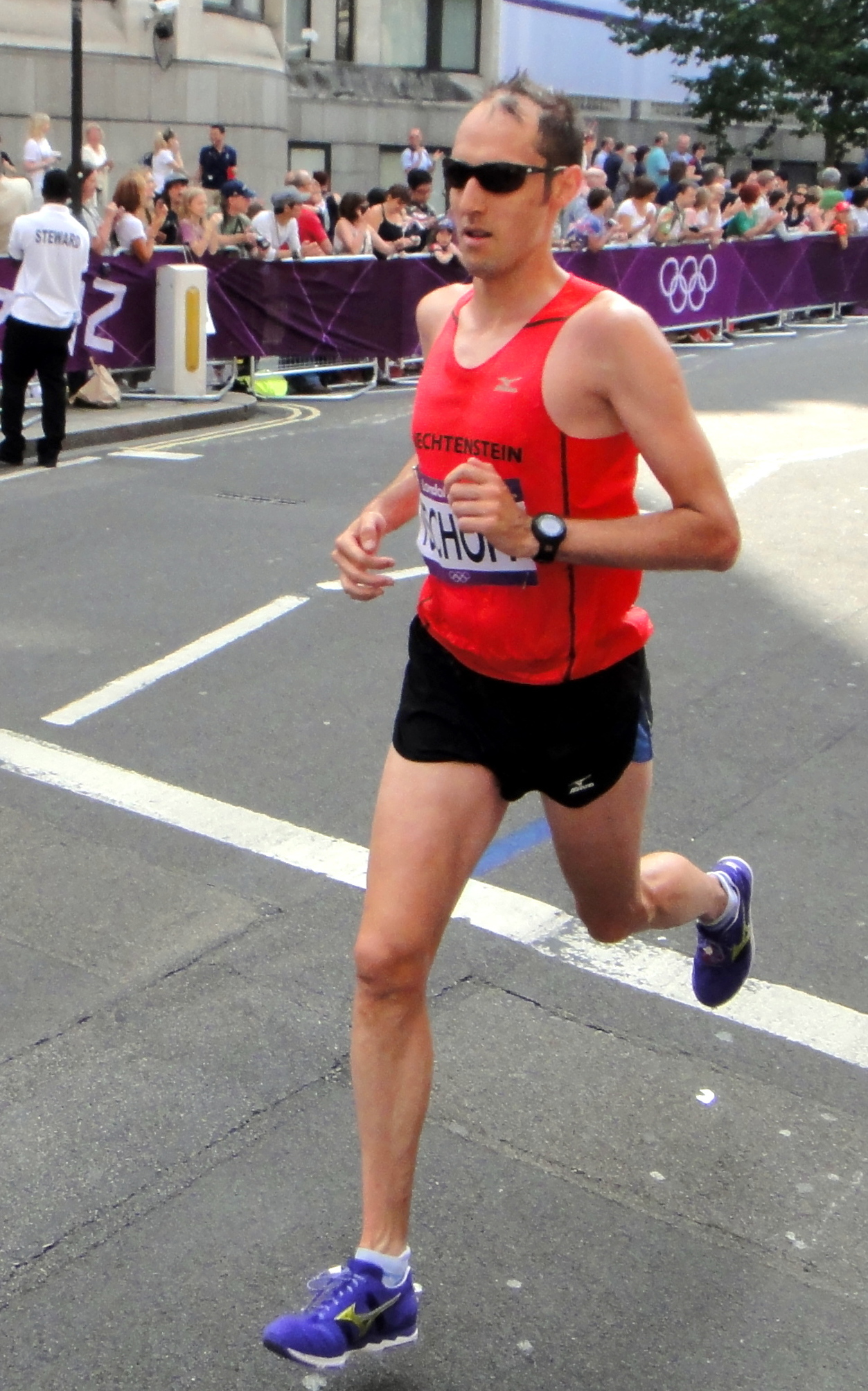 Marcel Tschopp (Liechtenstein) - London 2012 Men's Marathon